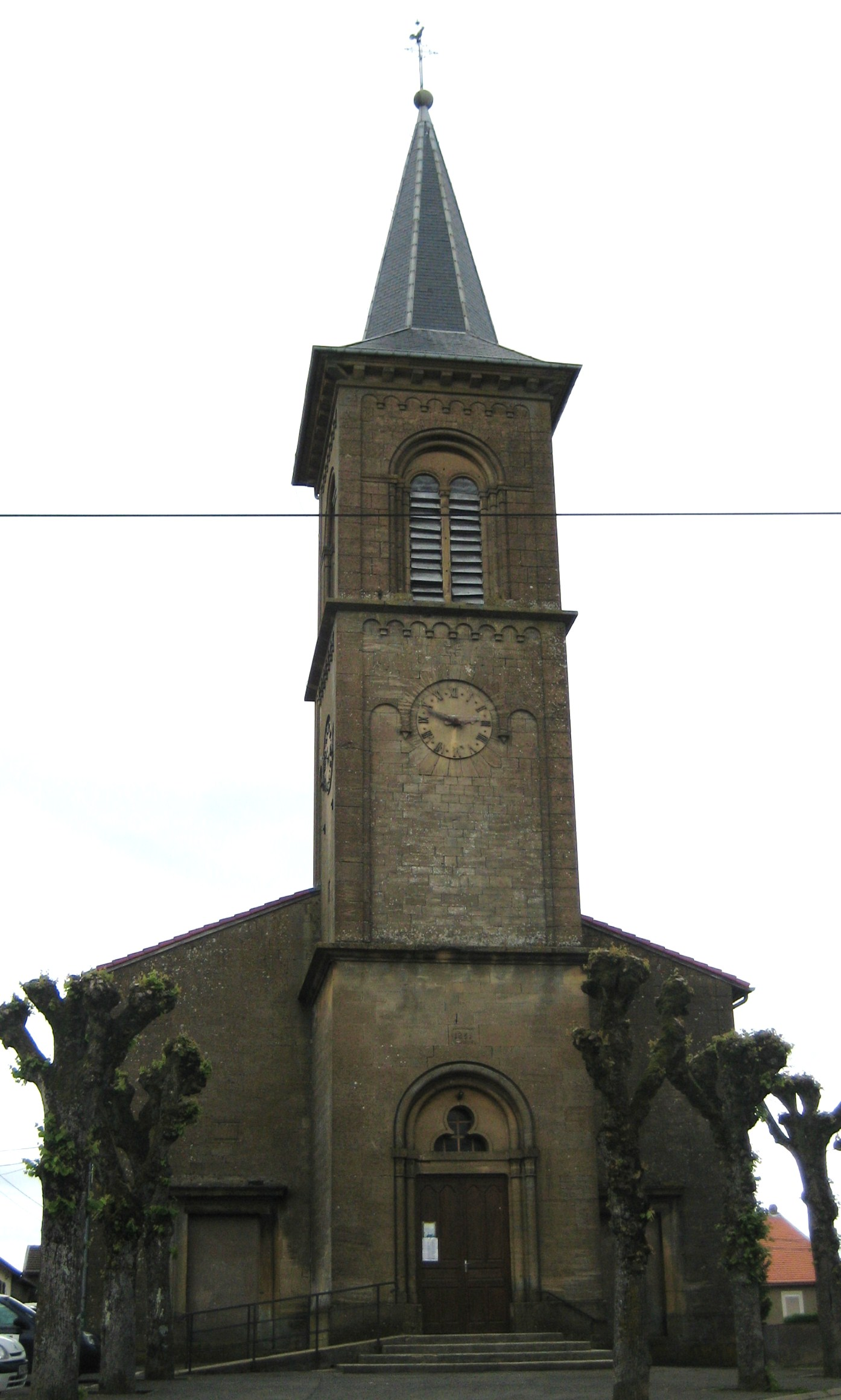 Description Eglise de TrieuxDate 16 May 2009Source mon appareil photoAuthor Aimelaime Eglise de Trieux